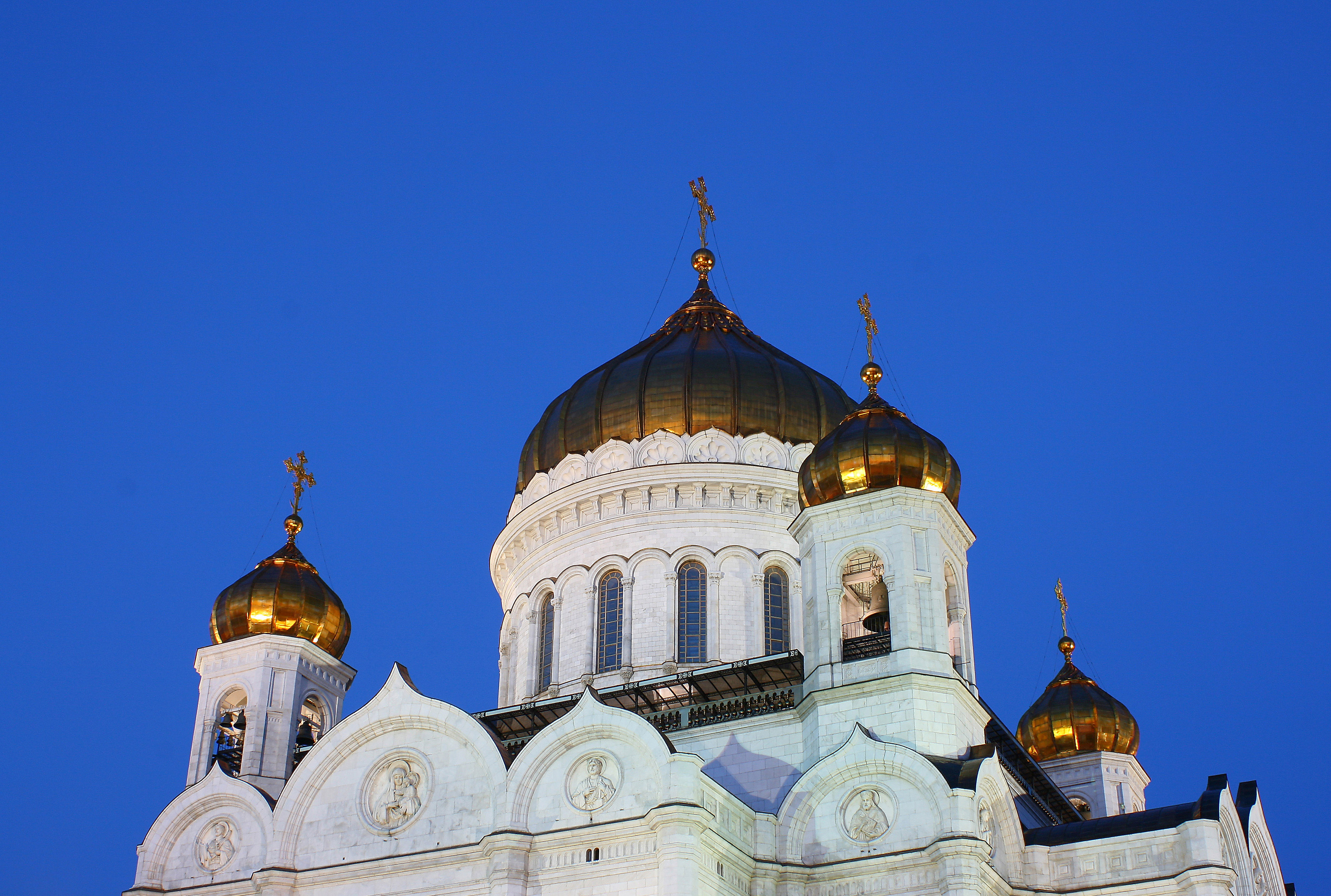 Храм Христа Спасителя